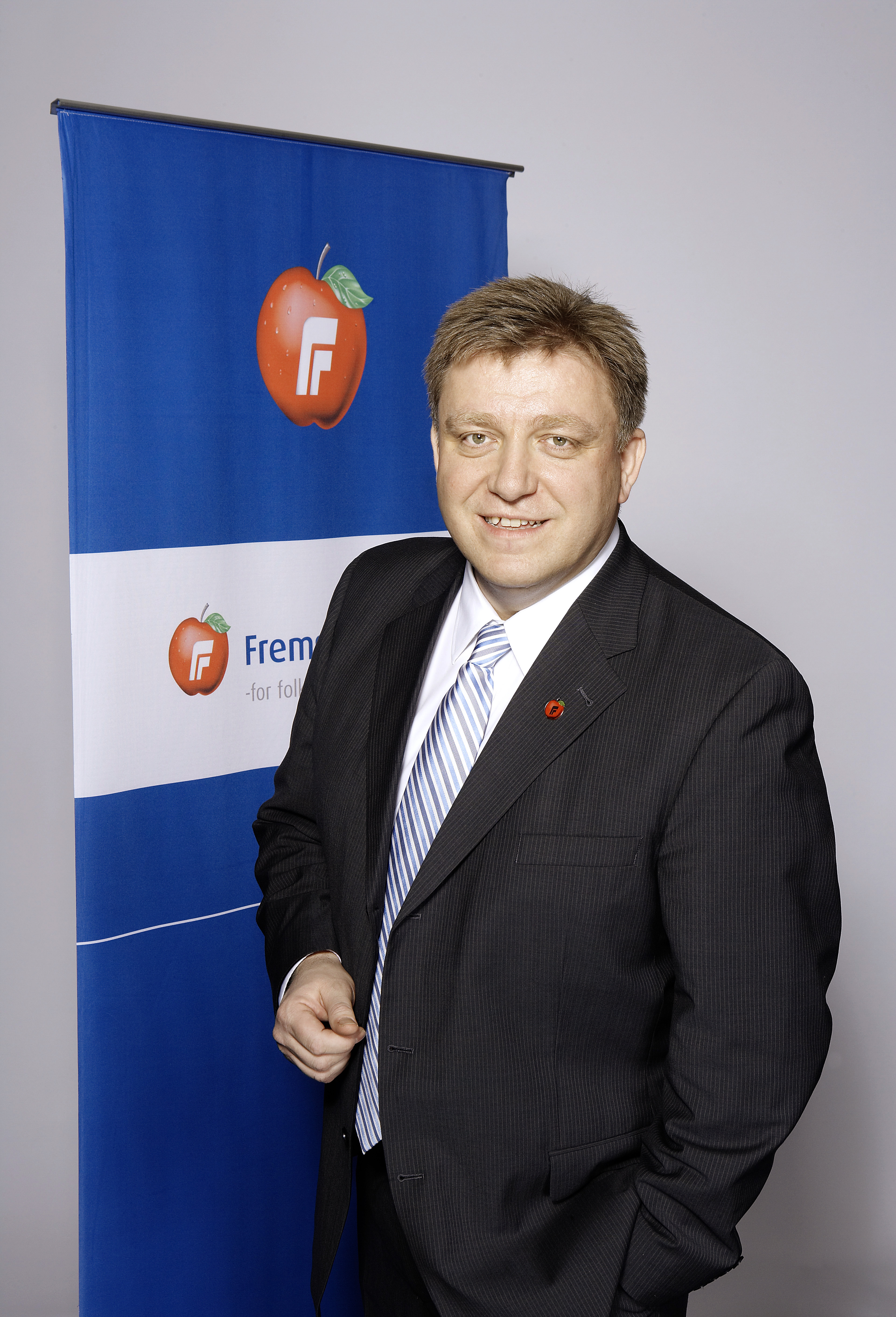 Geir Mo, FrP-politiker